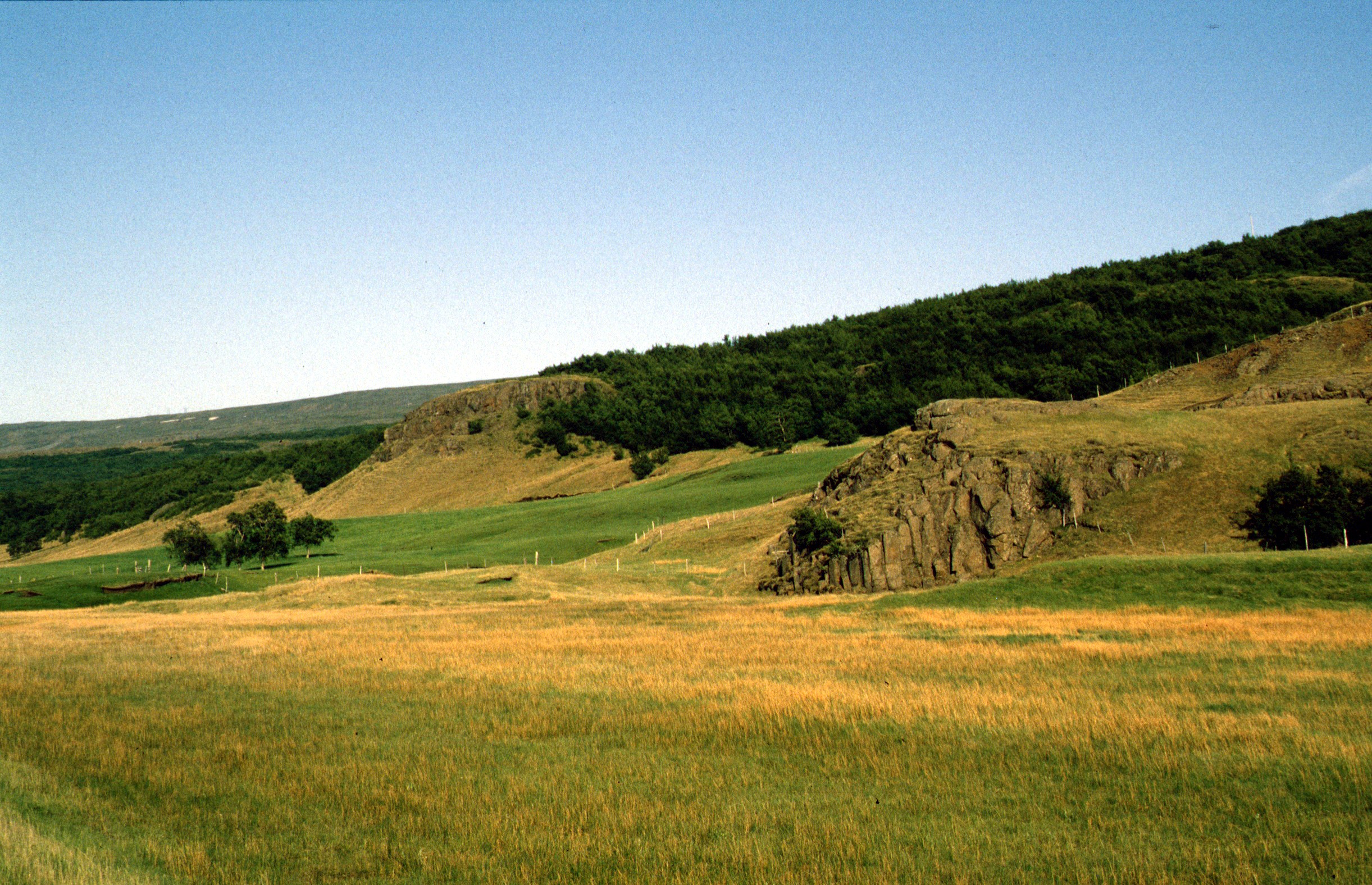 Weiden bei Skogar